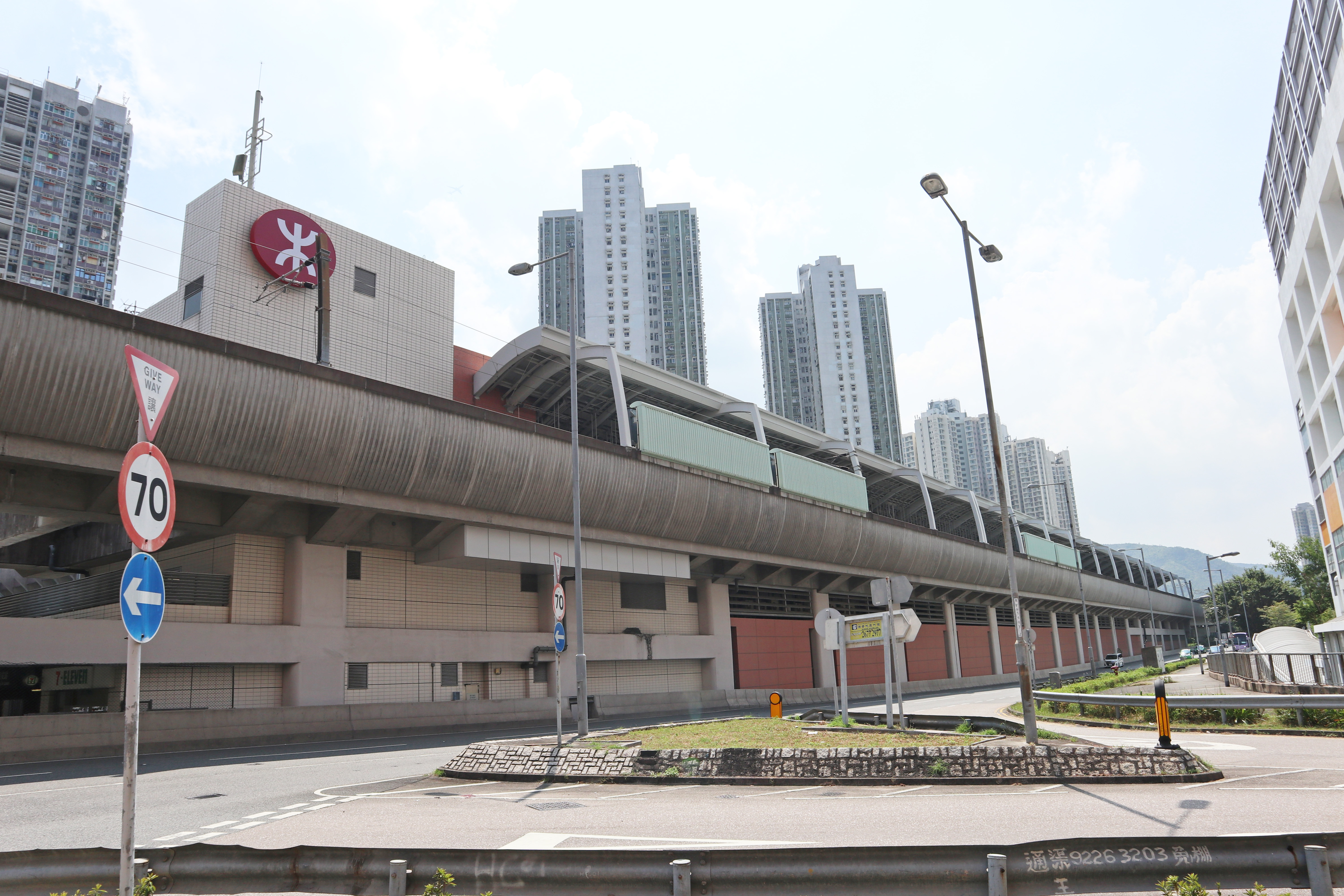 港鐵恆安站外貌